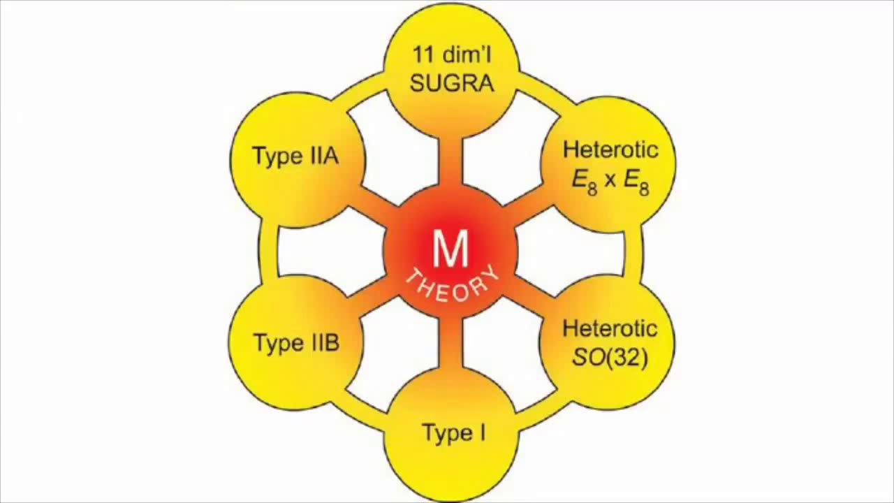 (نظرية - إم ( يمكن لاي احد استعمال الصورة